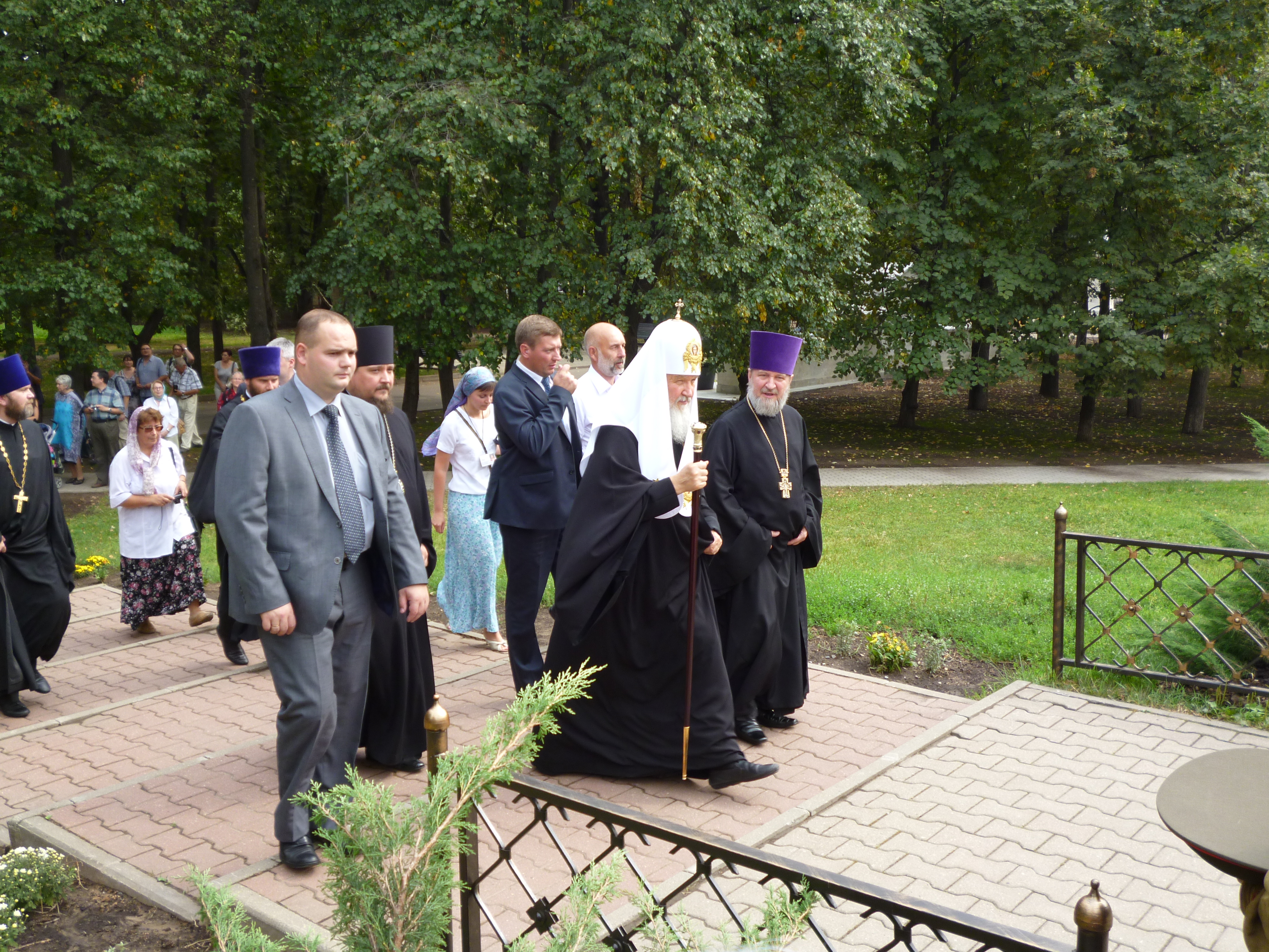 Патриарх Кирилл в Мемориальном парке совершает заупокойную молитву в часовне Спаса Преображения